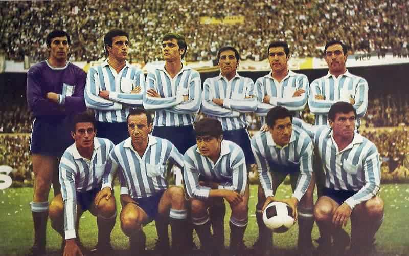 Plantel de Racing Club que obtuvo la Copa Intercontinental tras derrotar al Celtic FC en 1967. Parados: Cejas, Basile, Perfumo, Martín, Chabay y Rulli. Agachados: Cardoso, Maschio, Cárdenas, Rodríguez y Raffo.